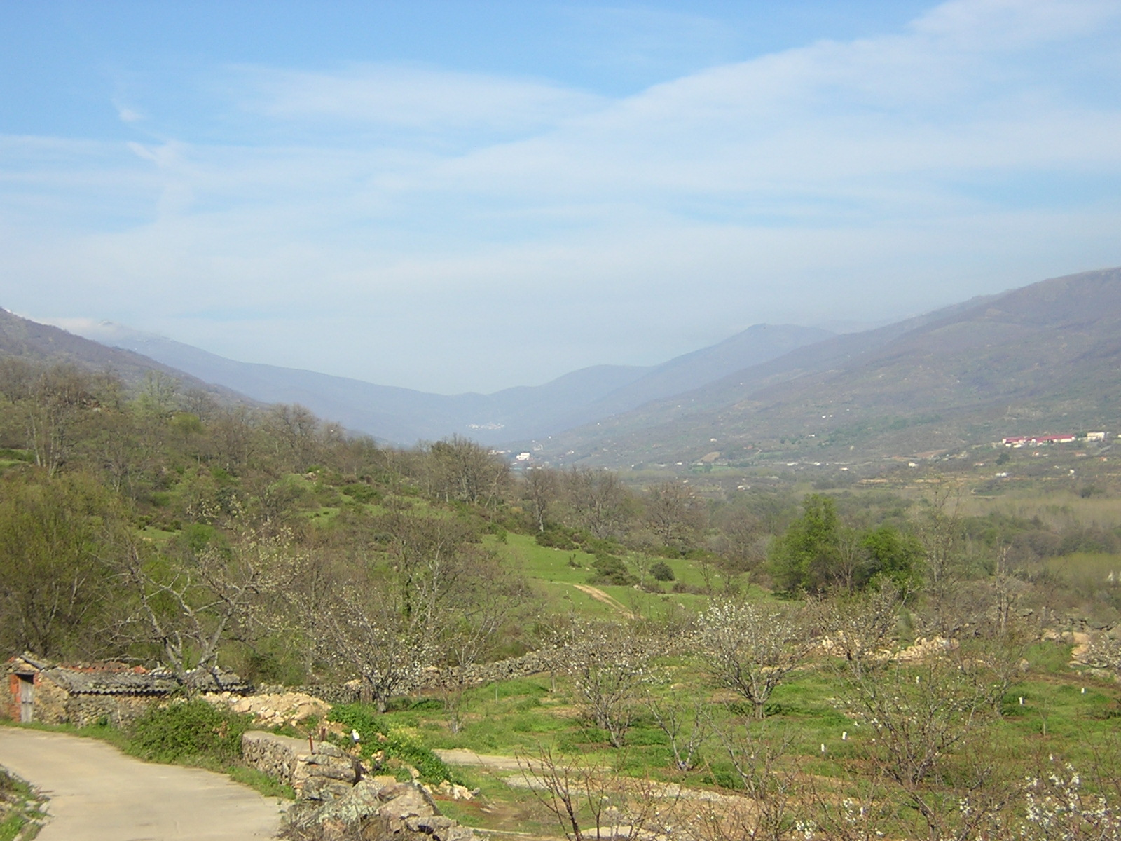 Puerto de Tornavacas